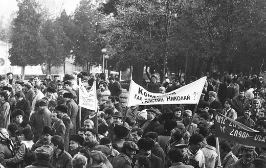 Արցախյան շարժում, 1988